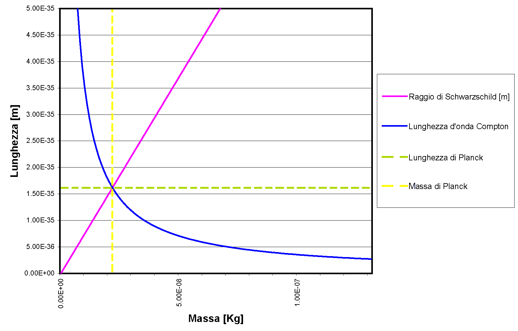 Il grafico illustra l'andamento del raggio di Schwarzschild e della lunghezza d'onda Compton ridotta, in funzione della massa. le coordinate del punto di intersezione delle due curve sono rispettivamente la Massa e la Lunghezza di Planck.